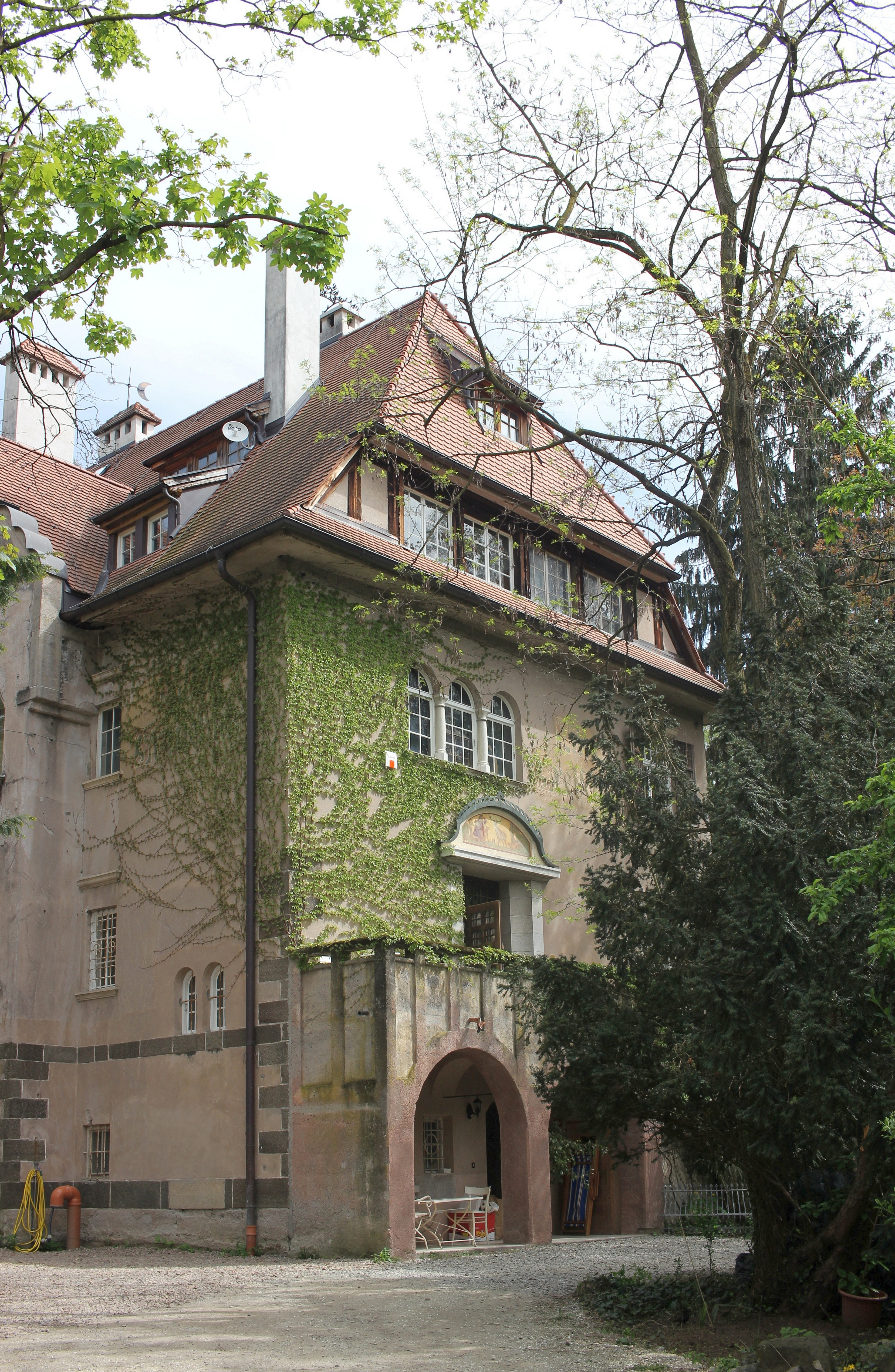 Villa Freischütz mit Garten, Priamiweg in Meran